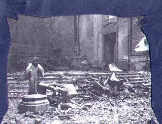 Fotografía de la Curia Metropolitana de Buenos Aires con los efectos del incendio por manifestantes el 16-6-55